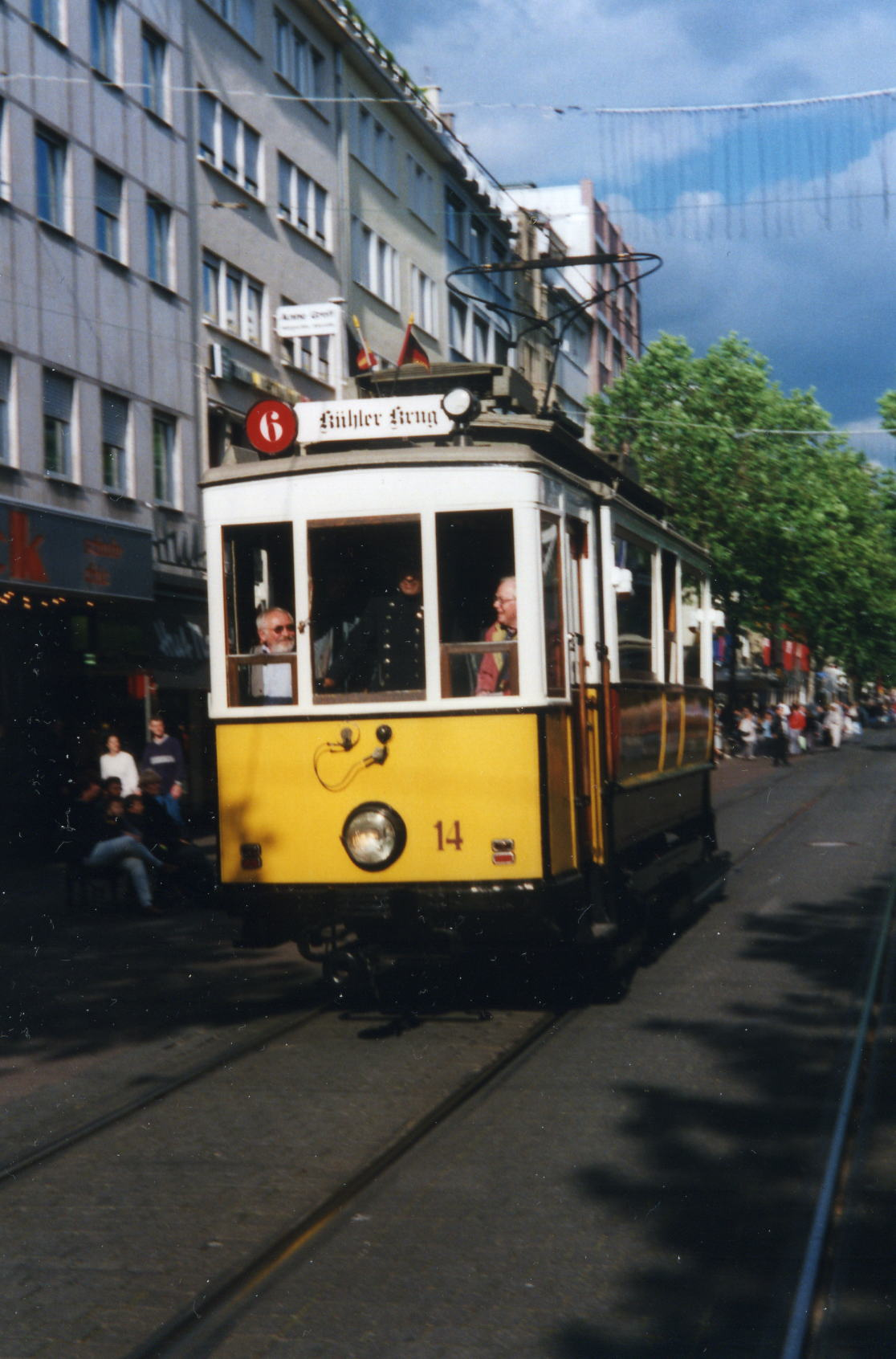 Straßenbahn-Triebwagen Nr. 14 der Karlsruher Straßenbahn in der Karlsruher Kaiserstraße